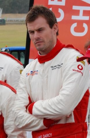 Luke Darcy